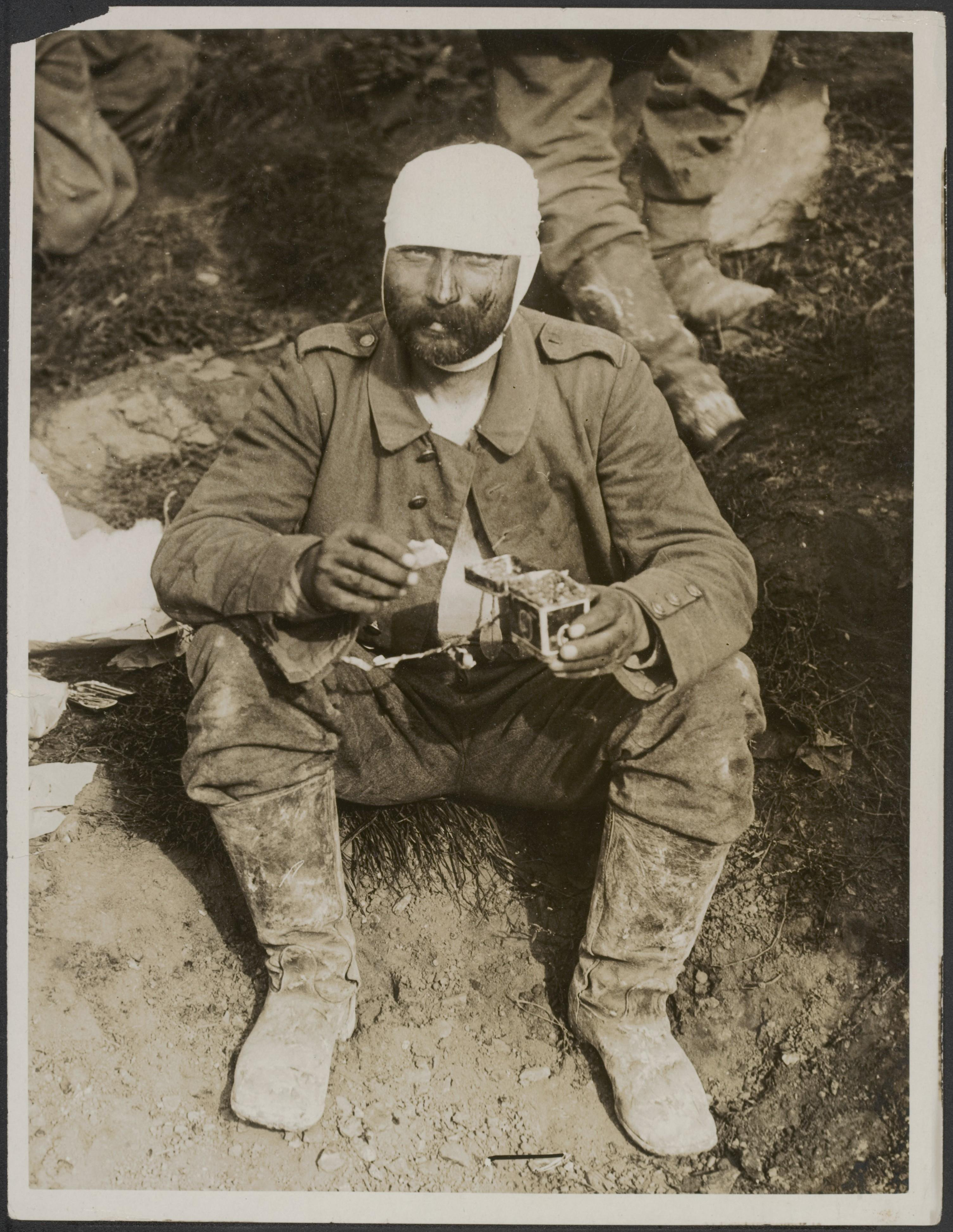 Collectie / Archief : Fotocollectie Eerste Wereldoorlog Reportage / Serie : The Western front Beschrijving : A German prisoner finds bully beef a great luxury. Annotatie : Het Westelijk front. Een Duitse krijgsgevangene vindt cornedbeef een grote luxe. Datum : {1914-1918} Trefwoorden : eerste wereldoorlog, fronten, krijgsgevangenen, voedselvoorziening Fotograaf : Central News Auteursrechthebbende : Public Domain logo Materiaalsoort : Foto (zwart/wit) Nummer archiefinventaris : bekijk toegang 2.24.09 Bestanddeelnummer : 158-2048